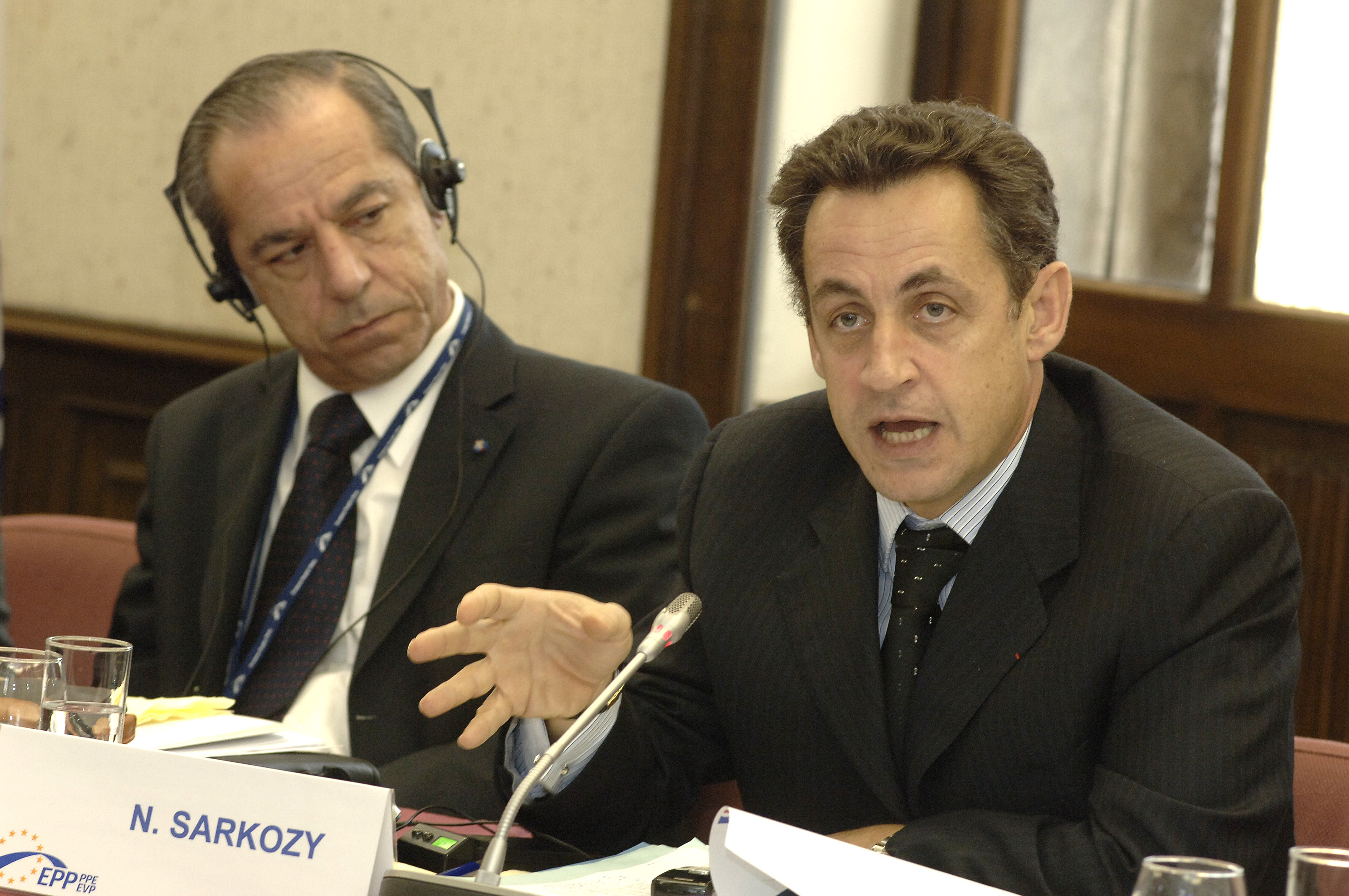 EPP Summit 14 December 2006